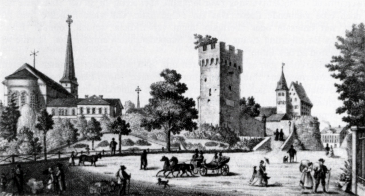 Bensheim im Jahr 1869. "Aussicht vom Schönberger Thal aus". Rechts im Bild er Gemminger Hof, der durch den Bau Liebfrauenschule abgerissen wurde. Aufnahme aus einem Bildband des Verlages G. Berger.